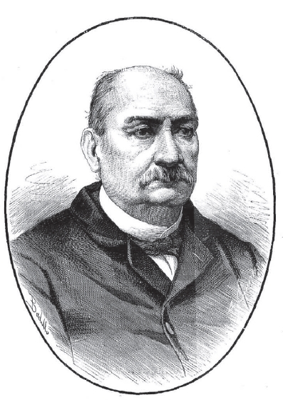 Retrato del artista Ponciano Ponzano